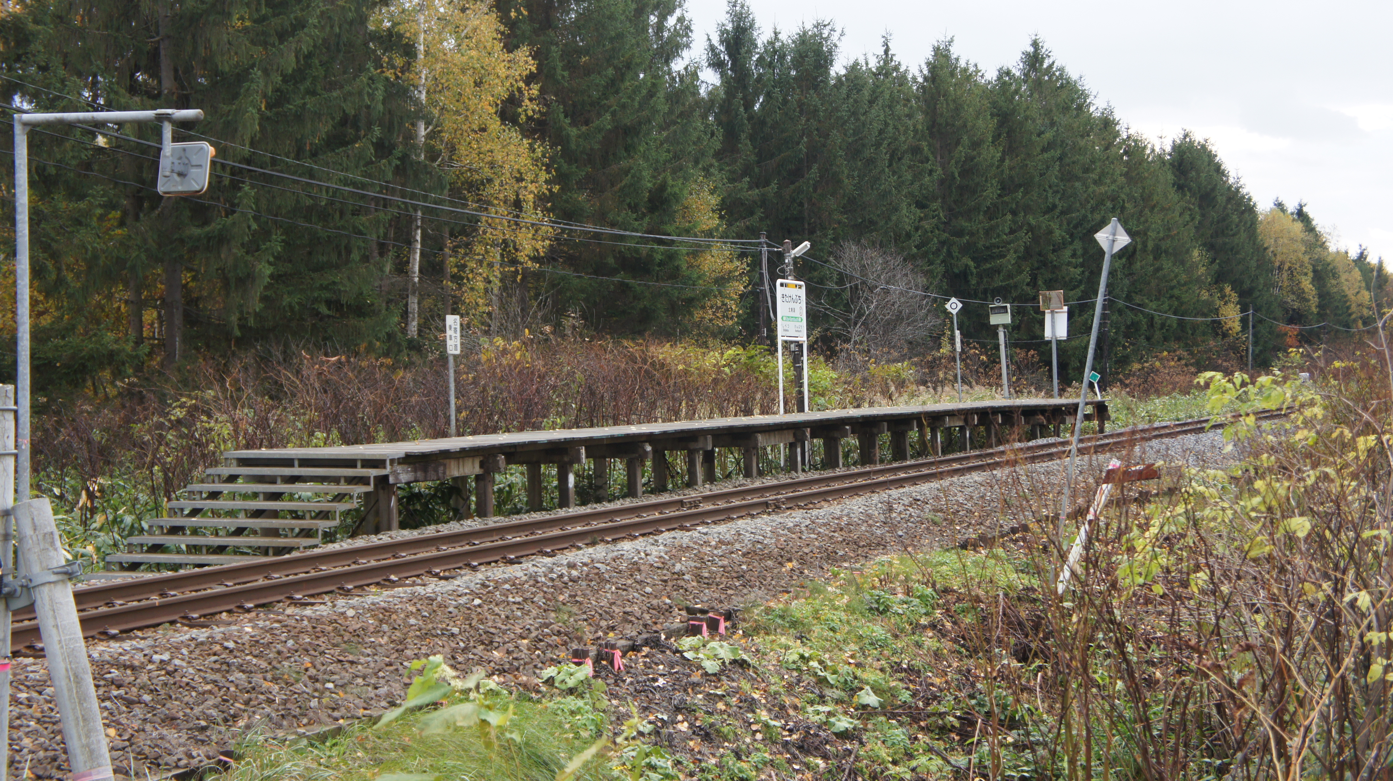 JR宗谷本線・北剣淵駅全景 Sony NEX-3